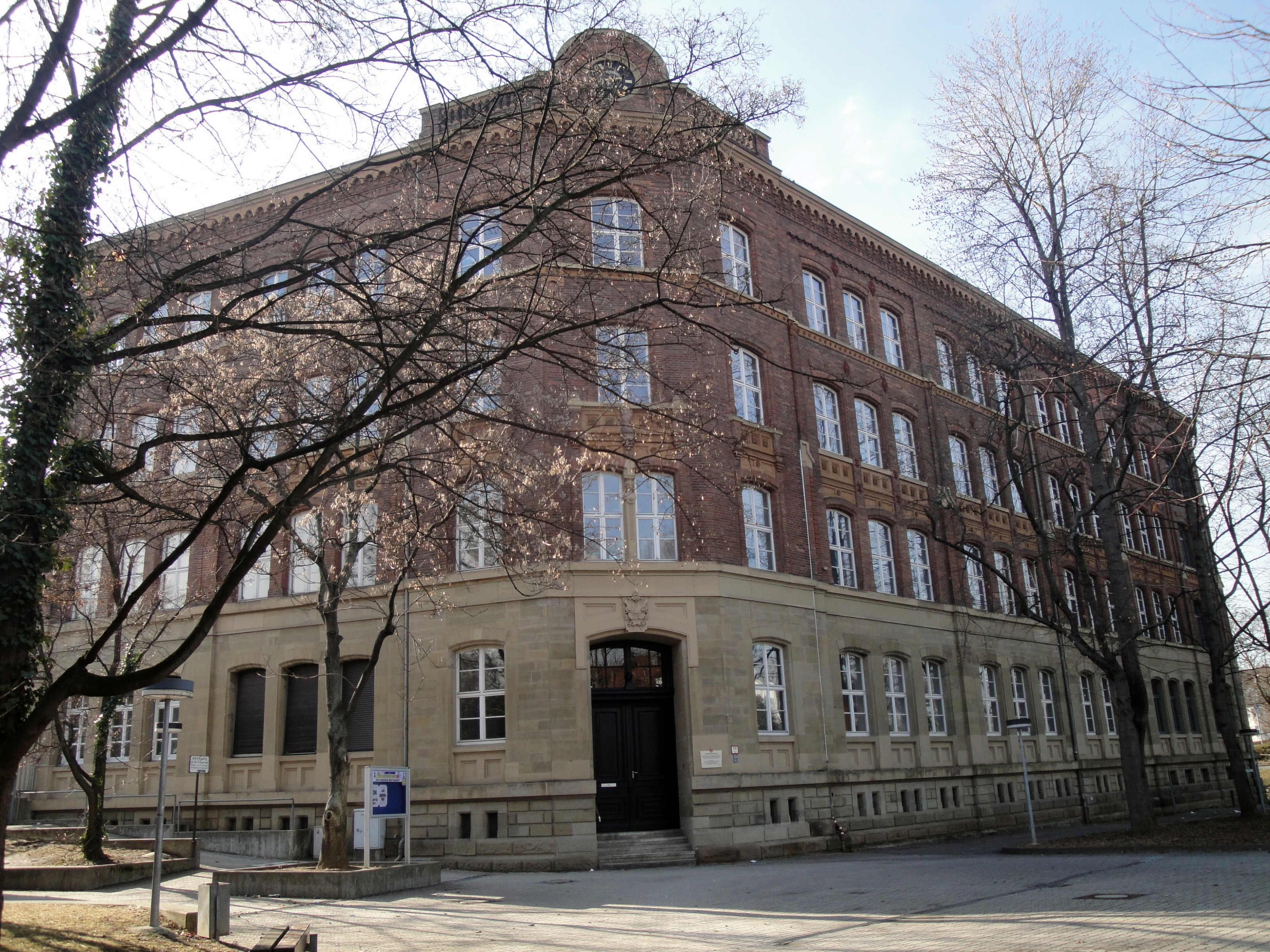 Jahn-Realschule (ehemaliges Gottlieb-Daimler-Gymnasium), Stuttgart-Bad Cannstatt